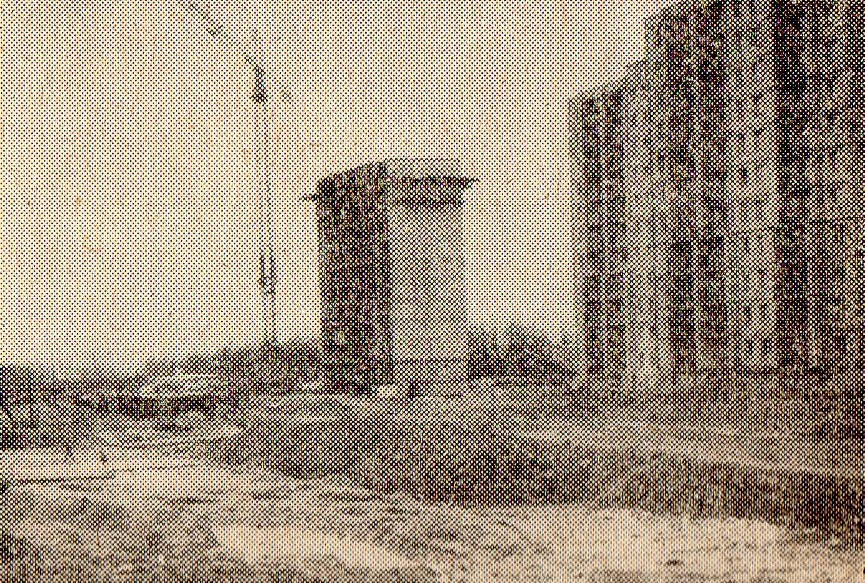 Budowa Klina Debieckiego, płd część. 15 kwietnia 1985r.